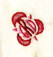 Chiffre brodé au point de cordon et au point sablé avec décors amande. Collection M.Peccaud.